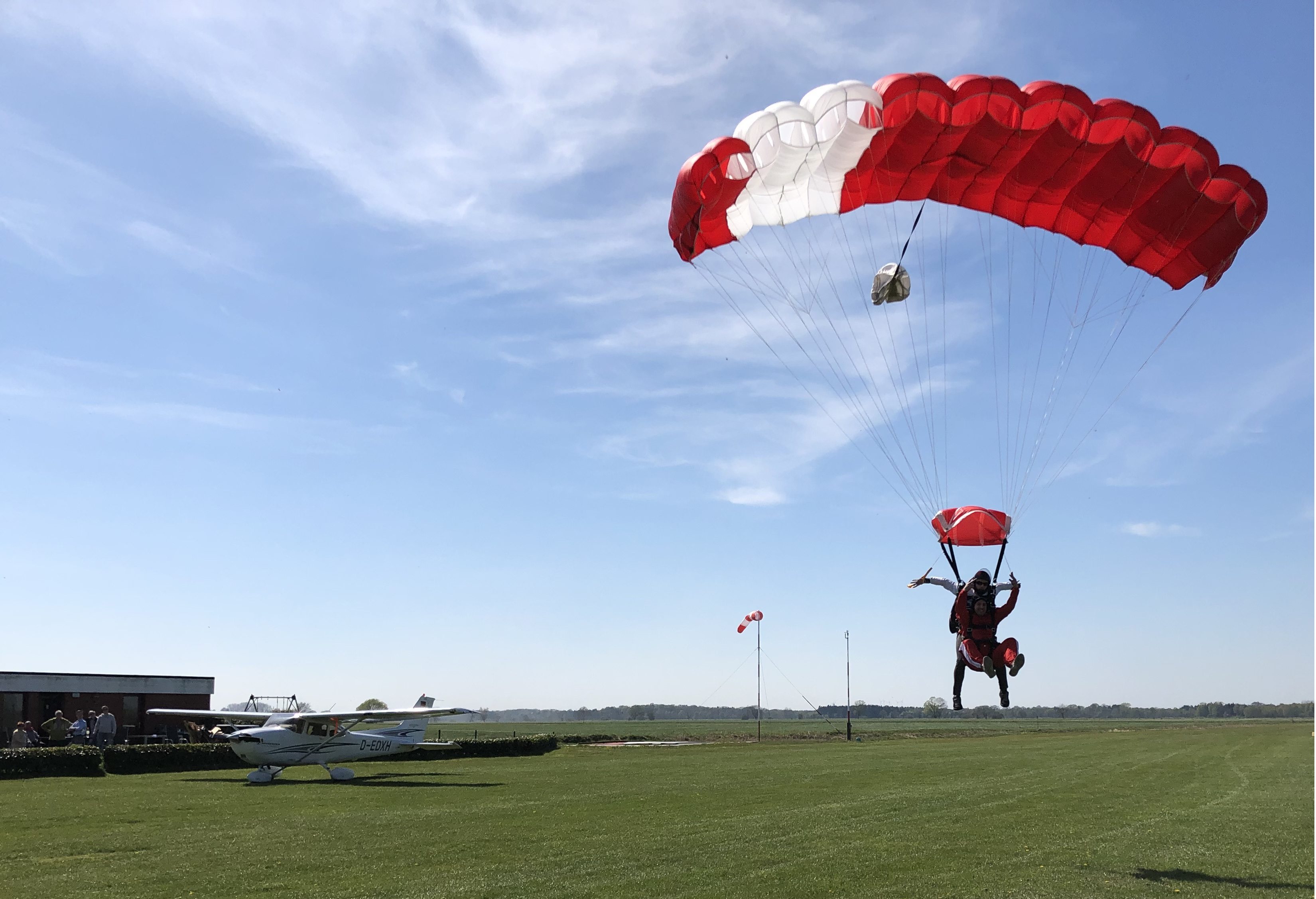 Tandemfallschirm bei der Landung